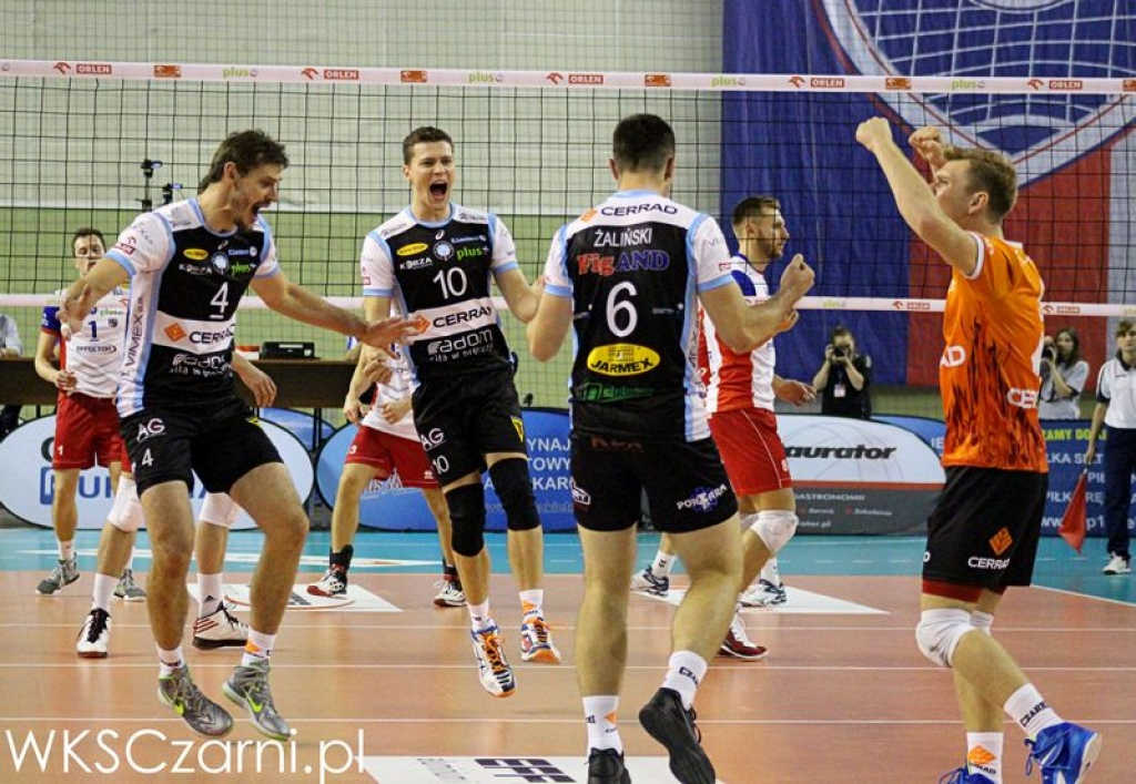 Mecz siatkarski pomiędzy Effectorem Kielcem i Czarnymi Radom. Plusliga 2014-15